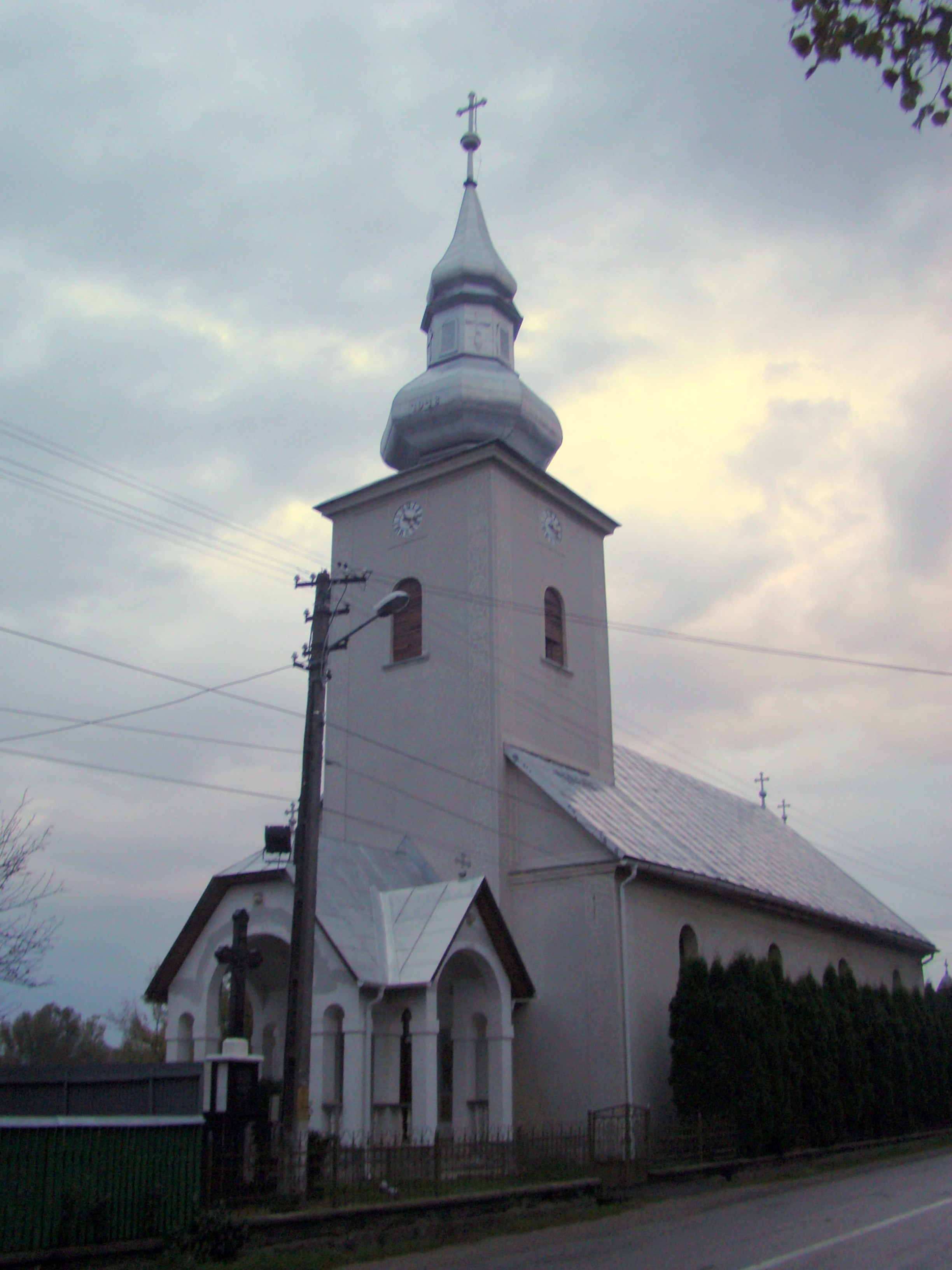 Biserica "Sf. Arhangheli Mihail și Gavril", sat Copalnic-Mănăștur; județul Maramureș